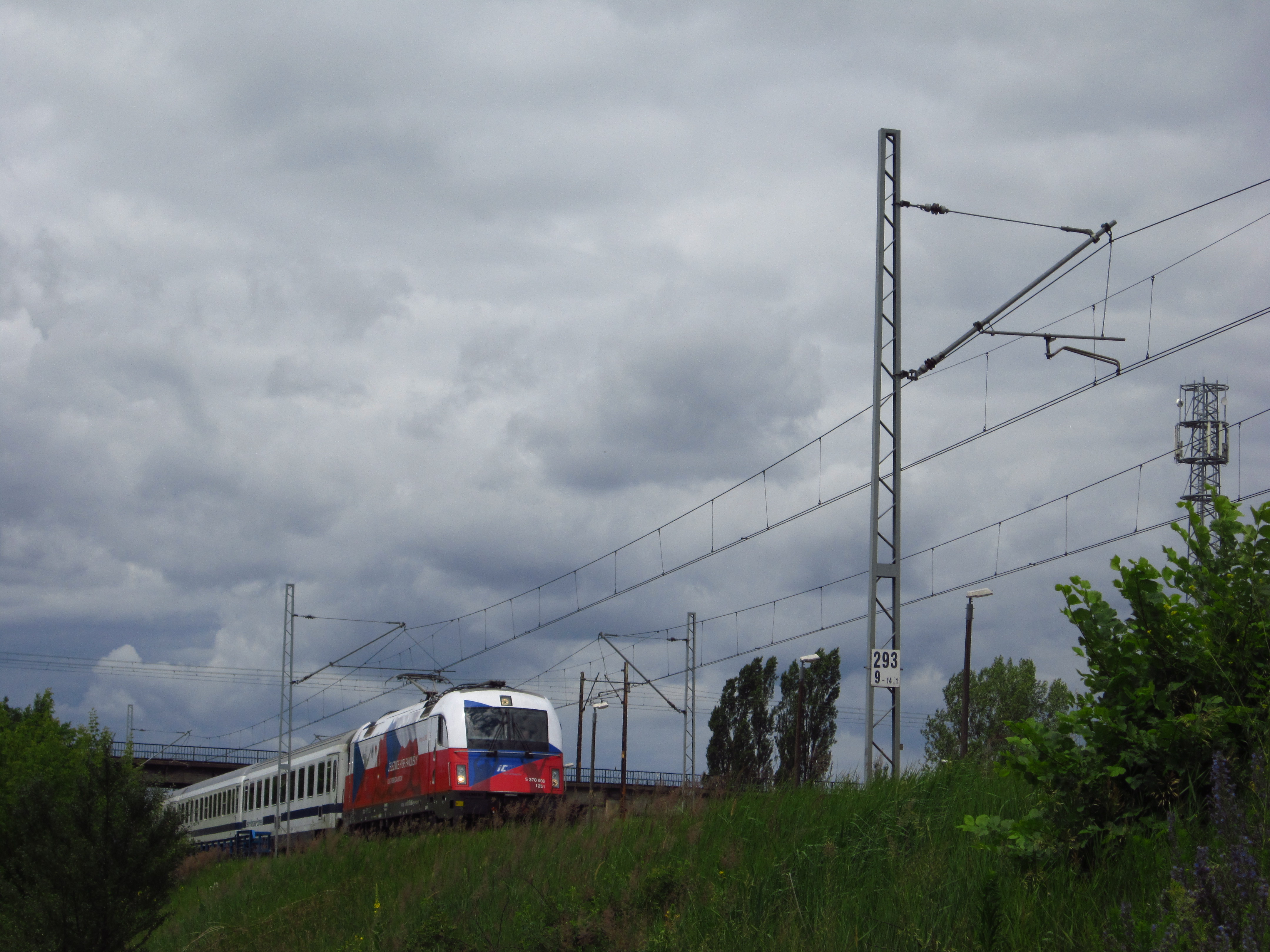 Lokomotywa EU44 oklejona w barwy Czechy na czas trwania EURO 2012.